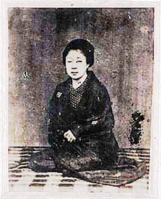 幕末の長崎の商人・大浦慶の写真